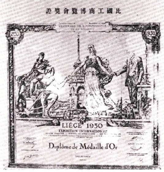 红三角牌纯碱1930年获比利时工商博览会金奖证书